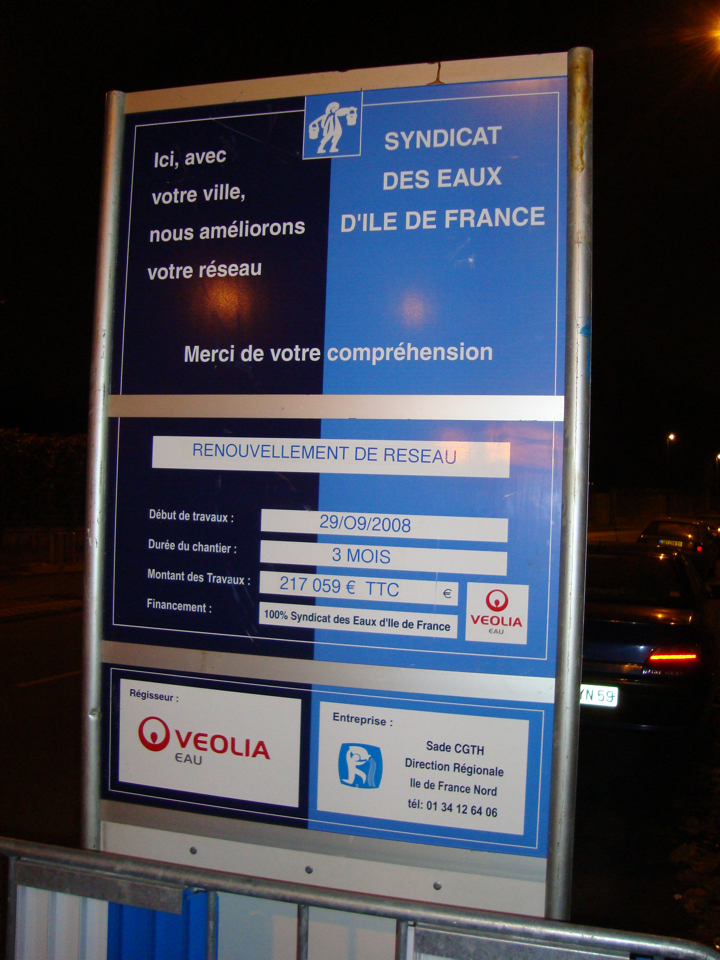 Panneau annonçant des travaux du Syndicat des Eaux d'Île-de-France à Saint-Denis (93).